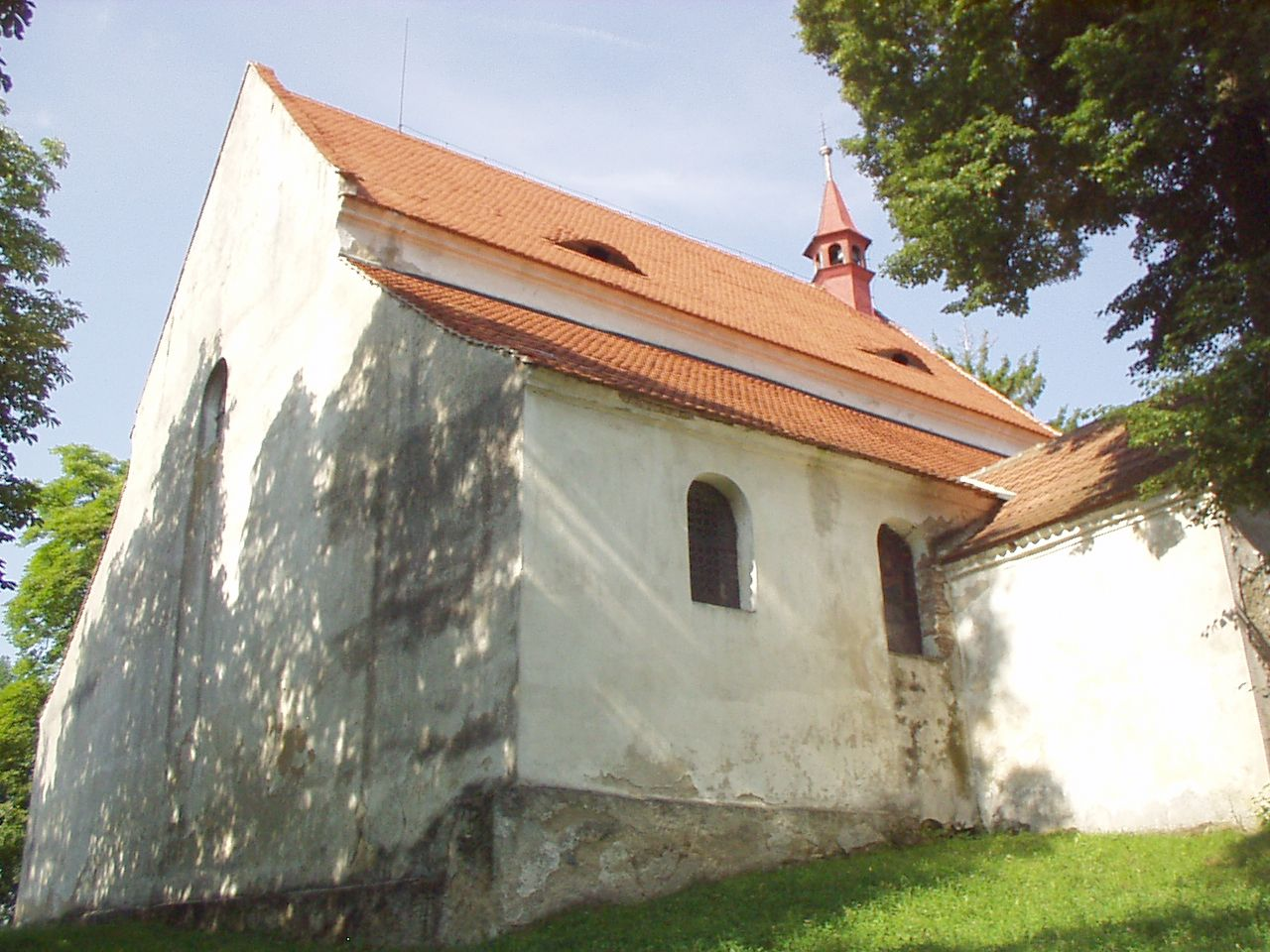 z původní románsko-gotické stavby se zachovala jen obdélníková hlavní loď zaklenutá dvěma poli křížové klenby; nynější pětiboké kněžiště a sakristie s portálkem pocházejí z pozdější pozdně gotické přestavby; od fary ke kostelu vede přes 40 schodů, položených roku 1736